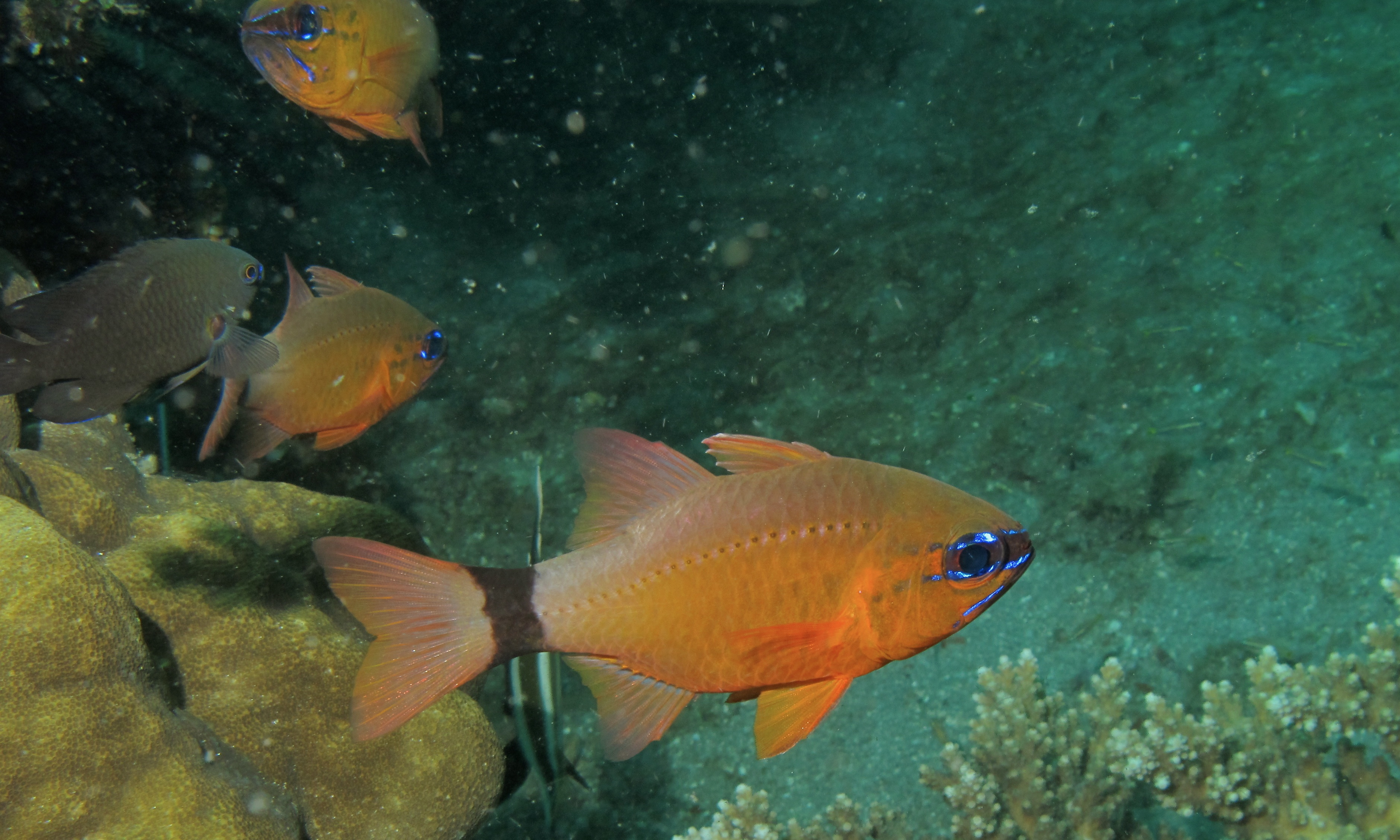 Pantai Parigi, Lembeh Strait, Sulawesi, INDONESIA